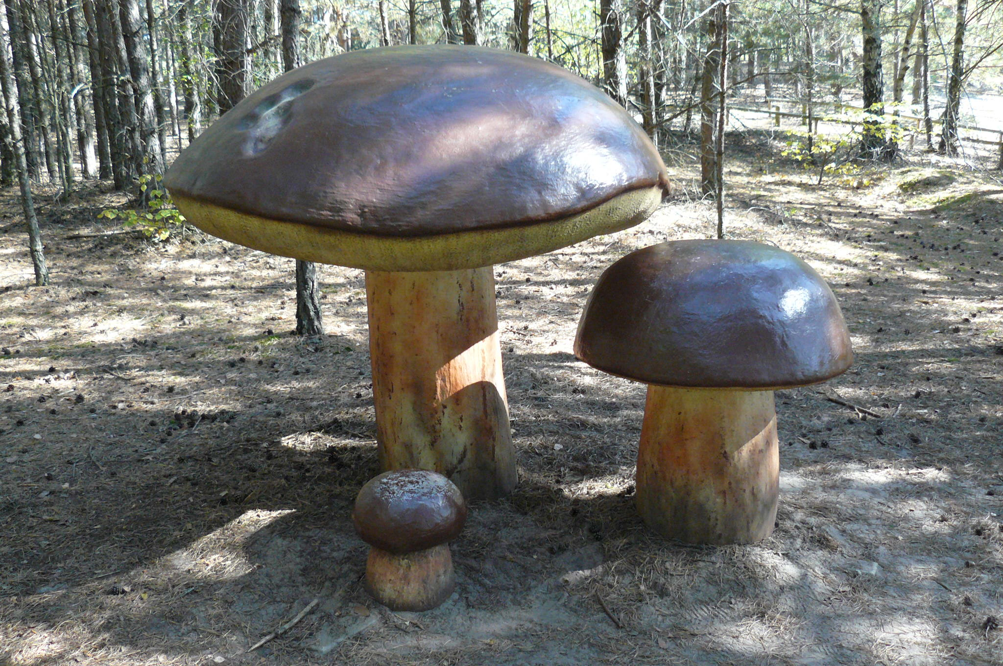 Park Grzybowy w Piłce.